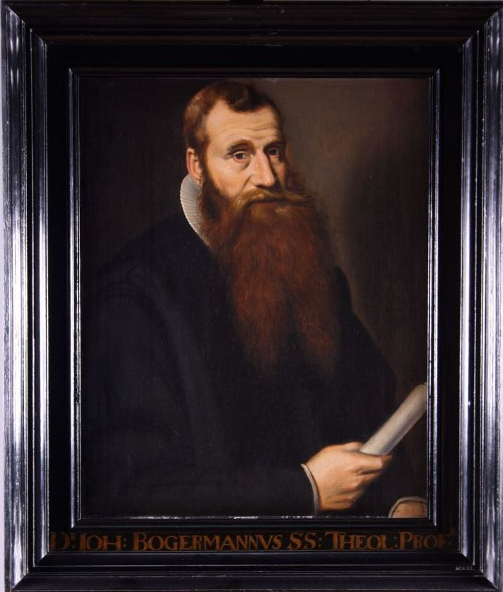 Portret in olieverf van Johannes Bogerman, professor in de godgeleerdheid aan de Franeker universiteit van 1633 tot 1637. Links naast zijn hoofd staat het opschrift 'AETAT 43'. Naast zijn rechterarm staat een zin die gedeeltelijk wegvalt: 'GEDUL..SEKERHE..VERWACHT…BELOFTEN…HEYT' (tekst: Museum Martena)